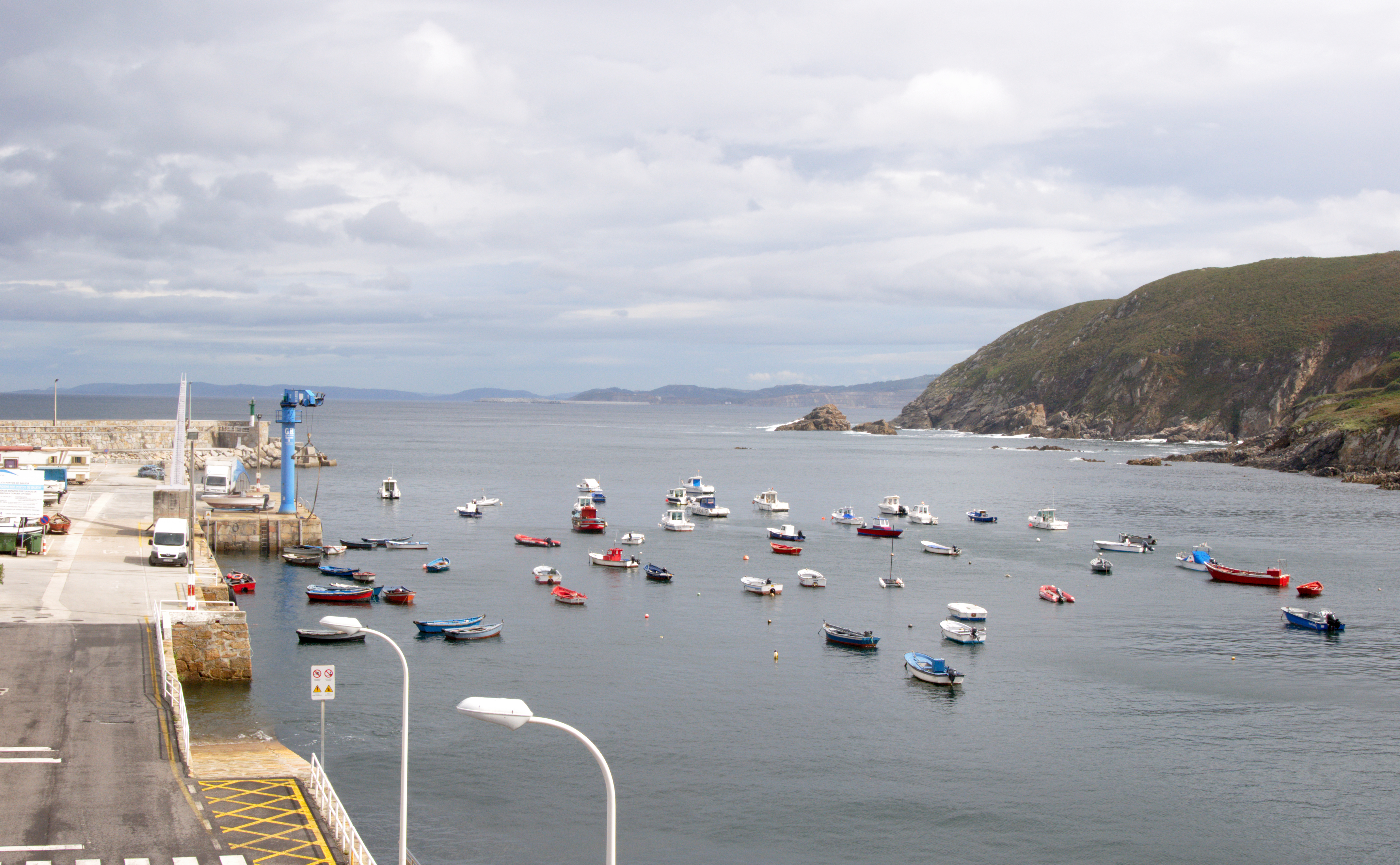 Caión, el puerto